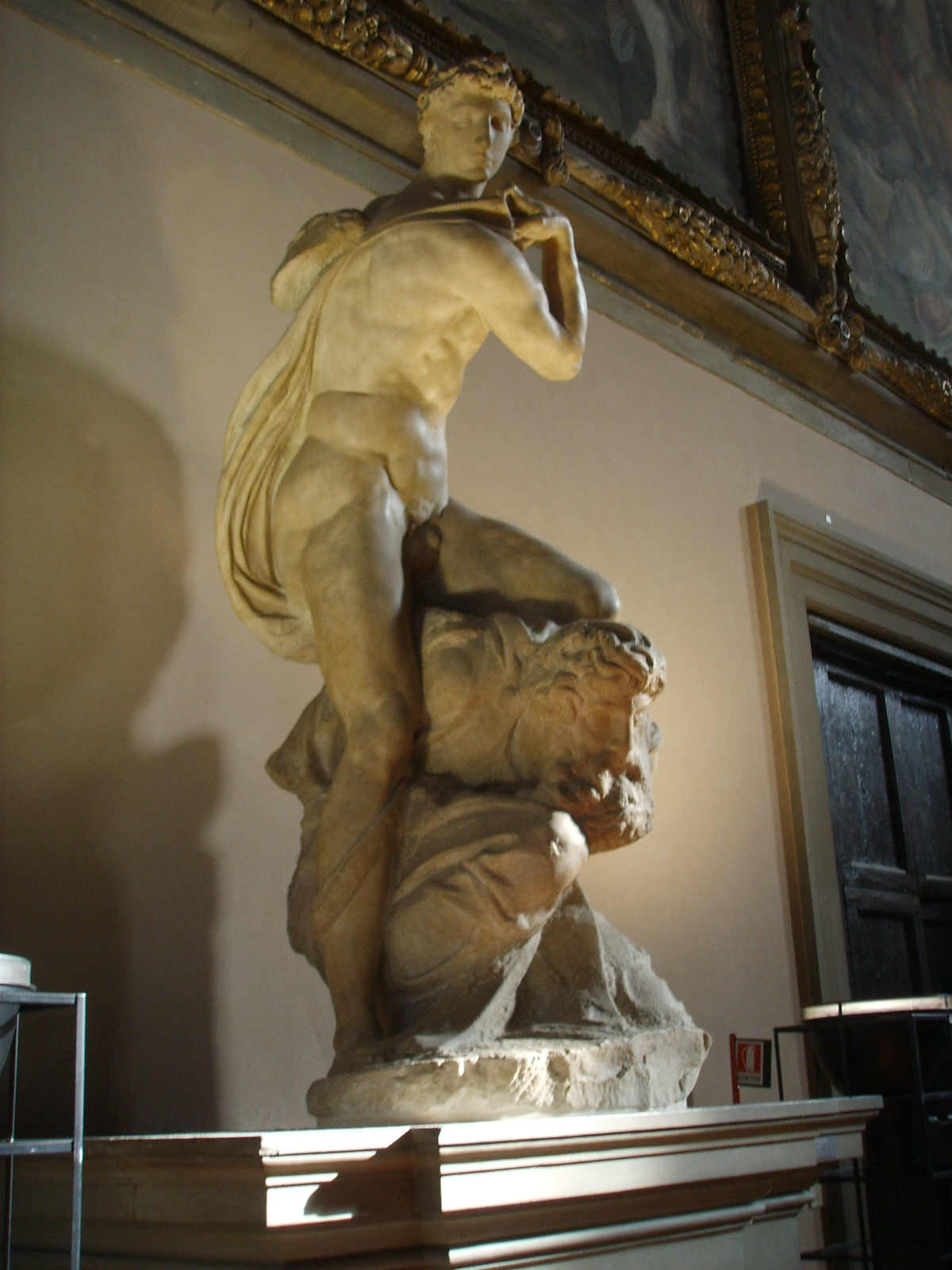 Palazzo vecchio, michelangelo, genio della vittoria